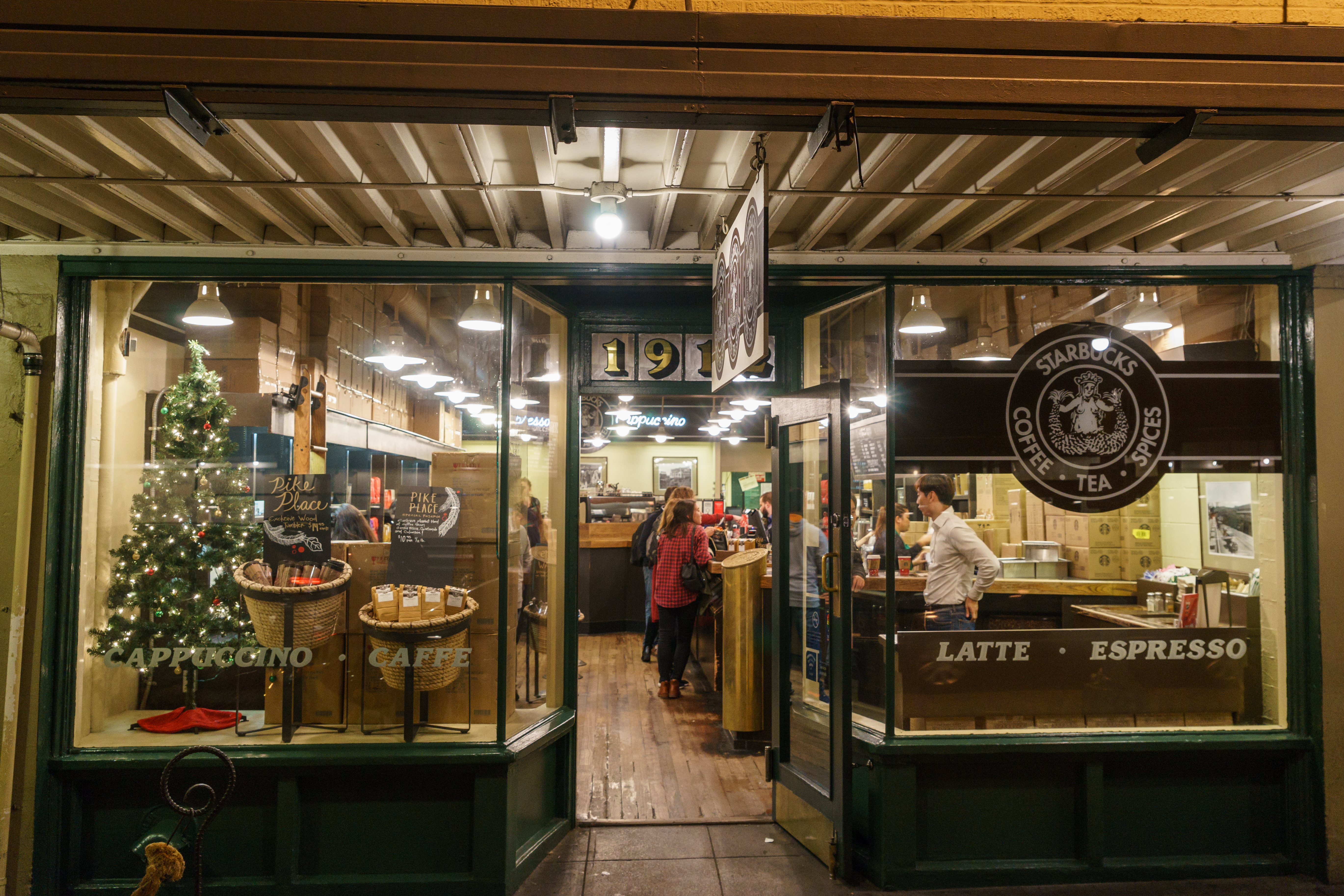 The first Starbucks store at Pike Place 1912, Seattle, WA